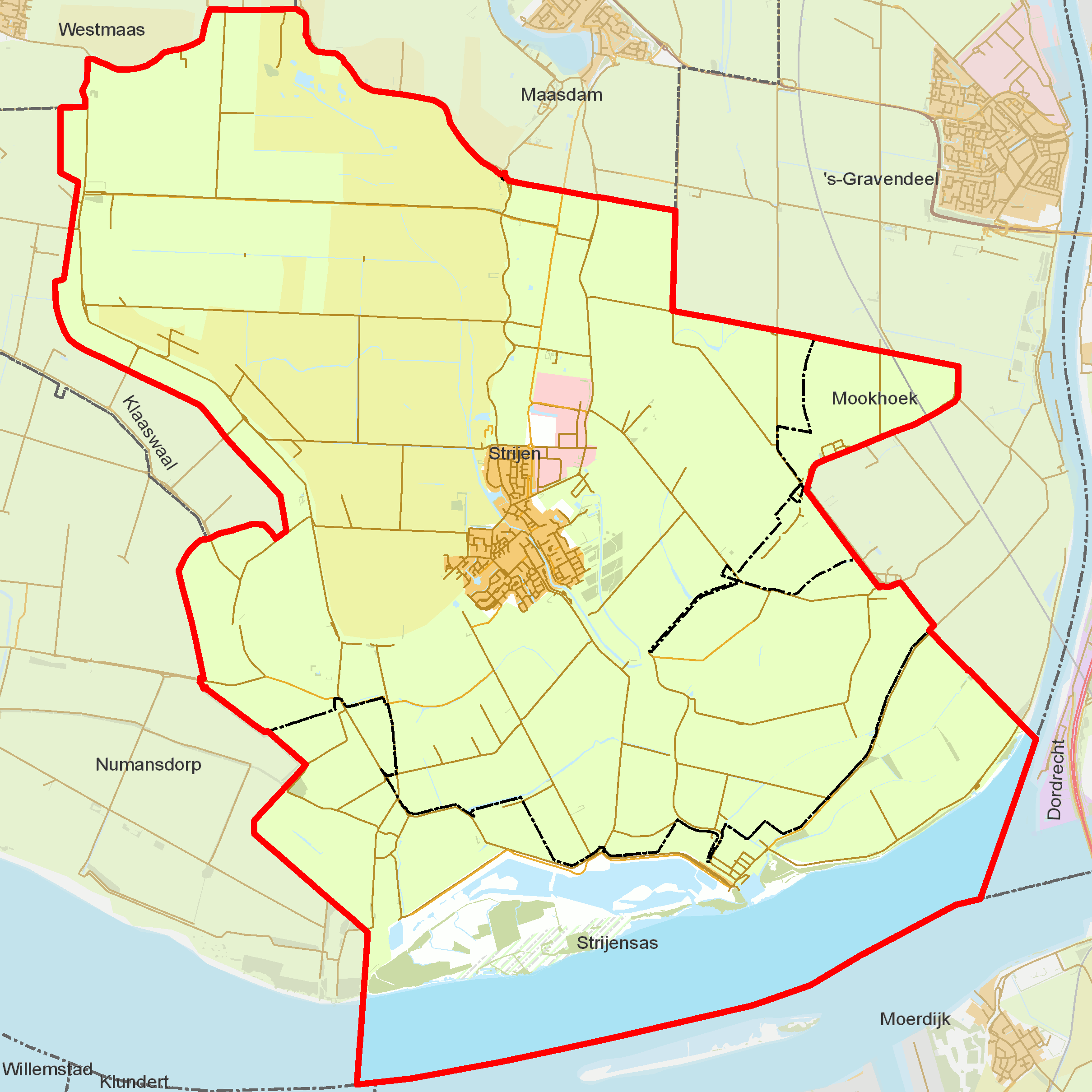 BAG woonplaatsen - Gemeente Strijen.png